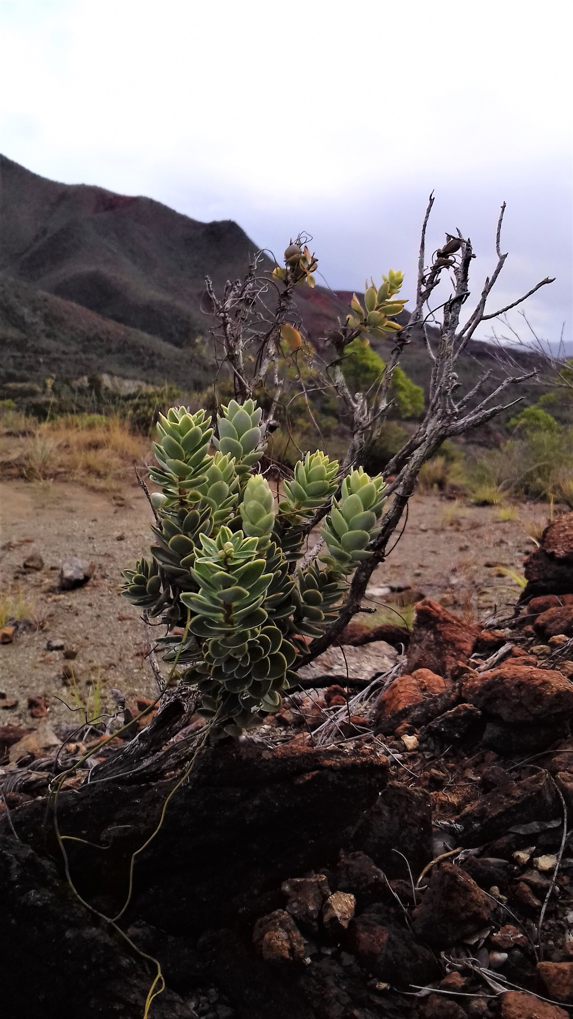 Cyathopsis albicans, vue d'ensemble (Pic aux Chèvres, Mont Dore, Province Sud, Nouvelle-Calédonie)